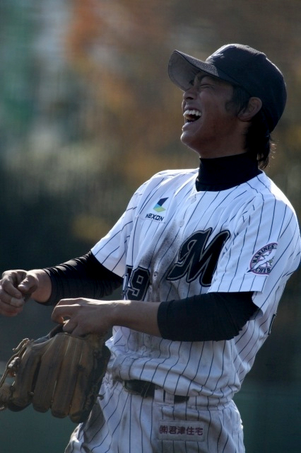 日本プロ野球 千葉ロッテマリーンズ 角晃多 内野手